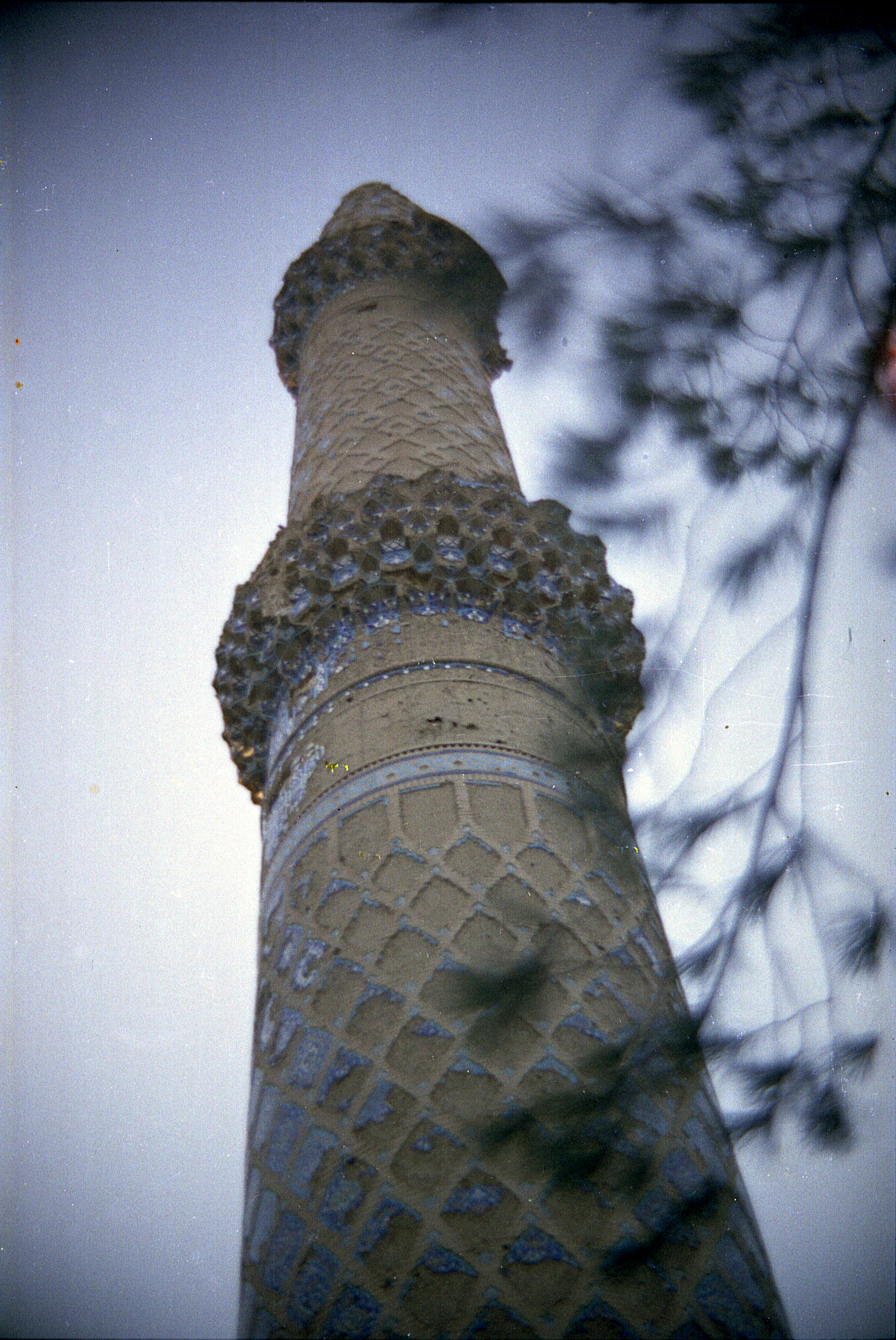 Afghanistan, herat, tour musalla en 1969